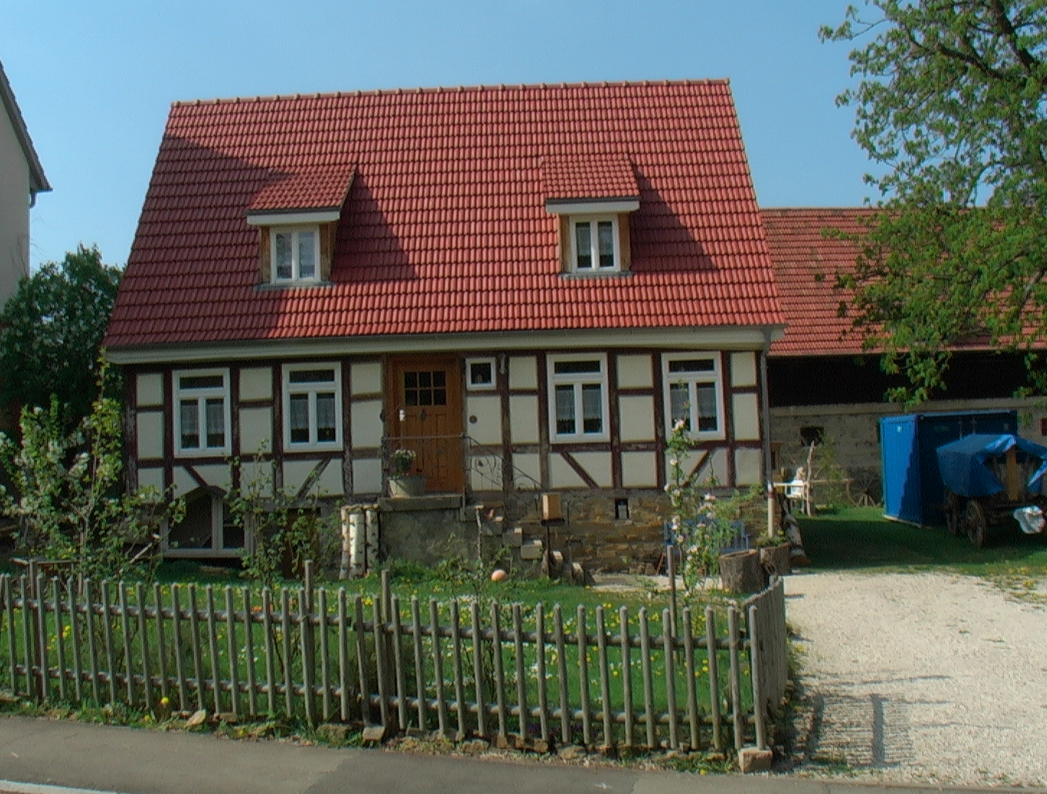 Das ehemalige Gemeindearmenhaus in der Öschinger Straße 16 in Gönningen wurde 1852 mit mehreren Wohnungen erbaut.